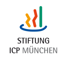 Logo der Stiftung ICP München (Integrationszentrum für Cerebralparesen